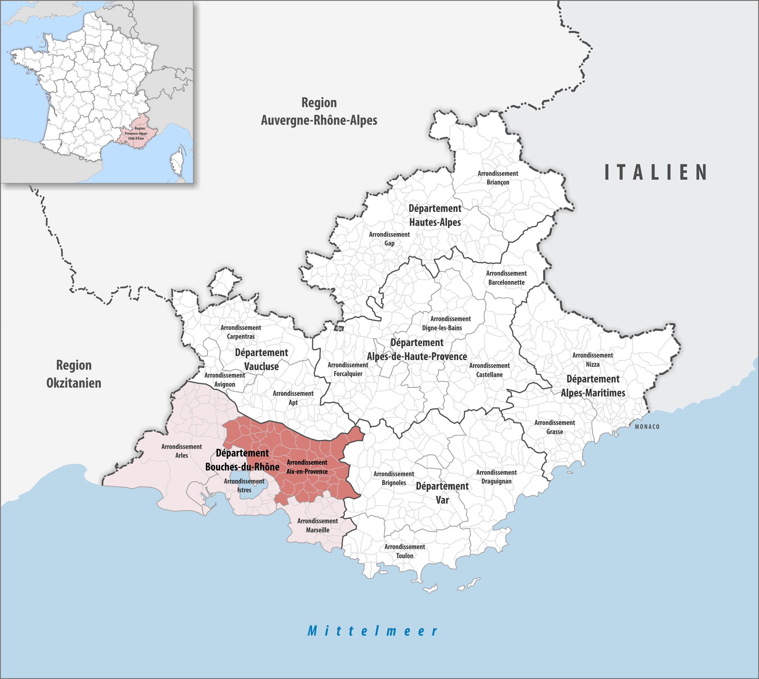 Lage des Arrondissements Aix-en-Provence